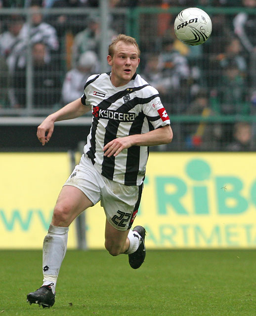 Tobias Levels, Nachwuchsspieler aus den eigenen Reihen